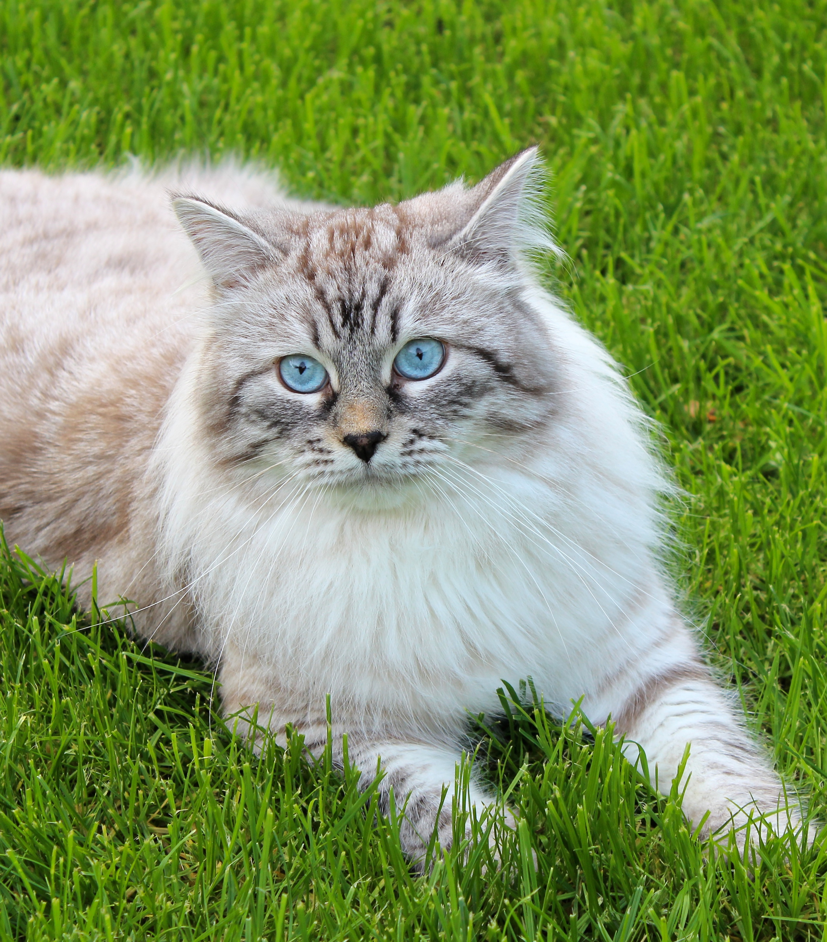 Bruntabby masket